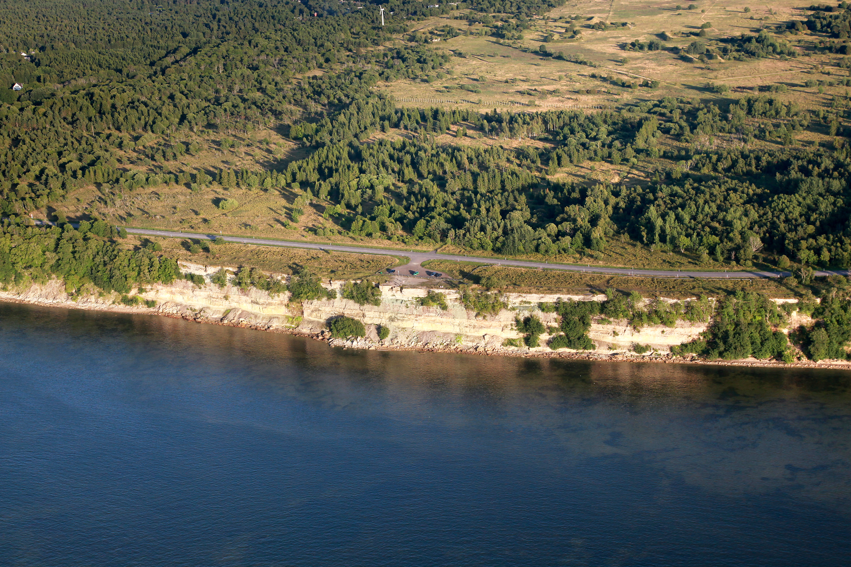 Türisalu pank aerofoto